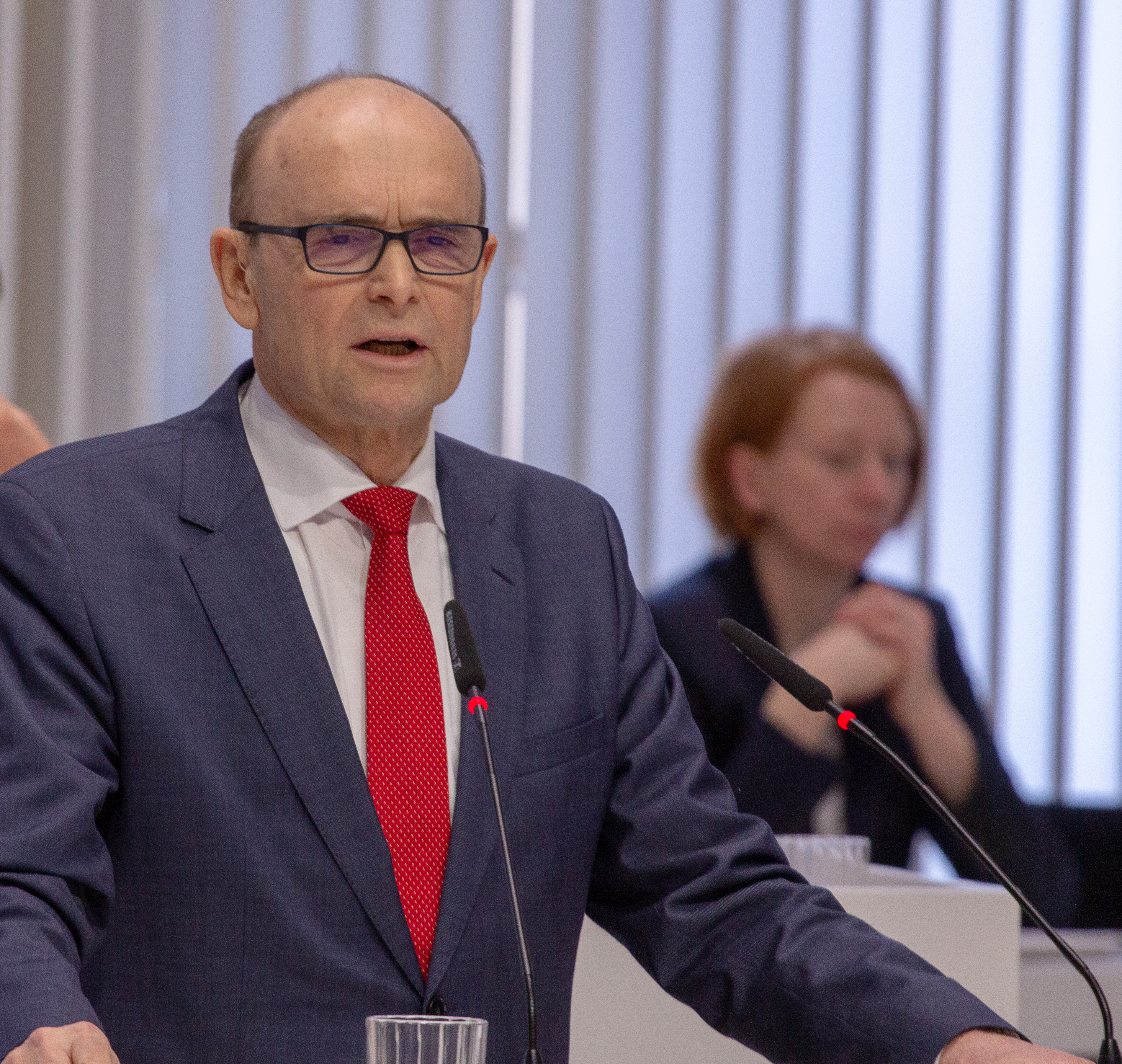 Erwin Sellering im Plenum des Landtages Mecklenburg-Vorpommern im März 2019.